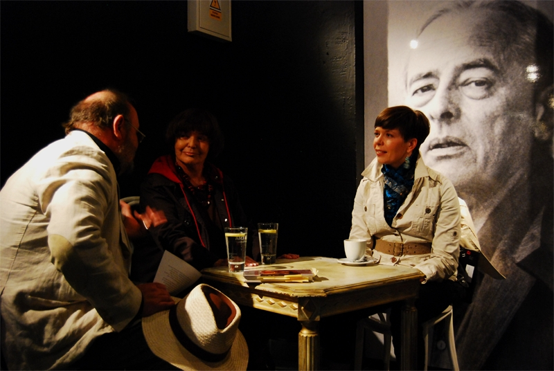 Hanna Krall, Paweł Huelle oraz Dorota Nowak (Świat Książki) podczas Literaturomanii 2009.